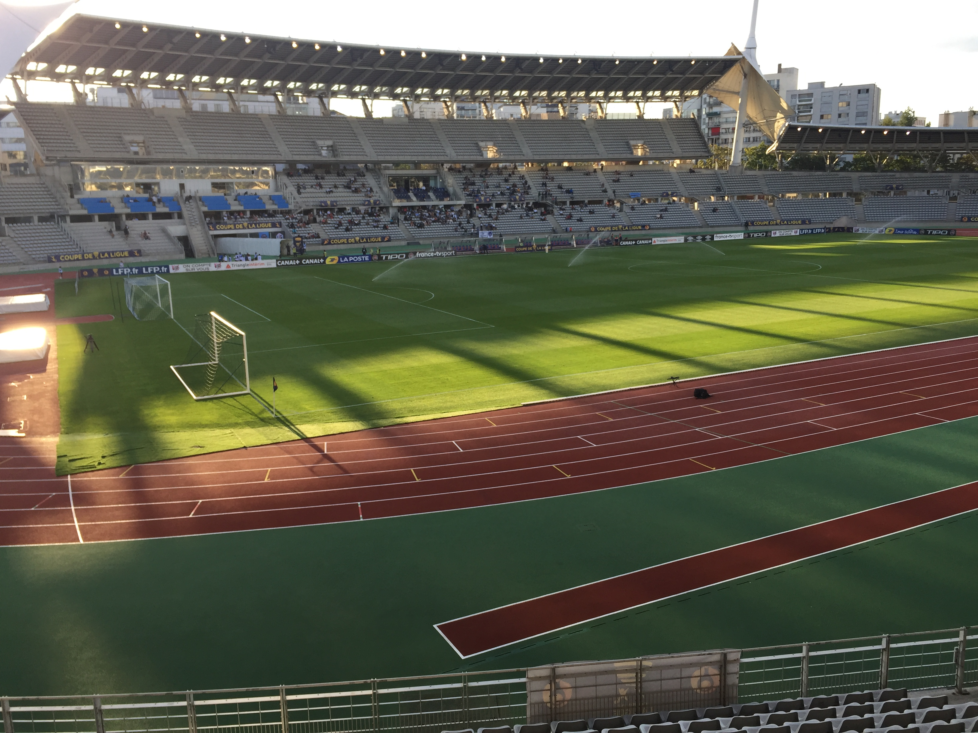 Stade Charléty